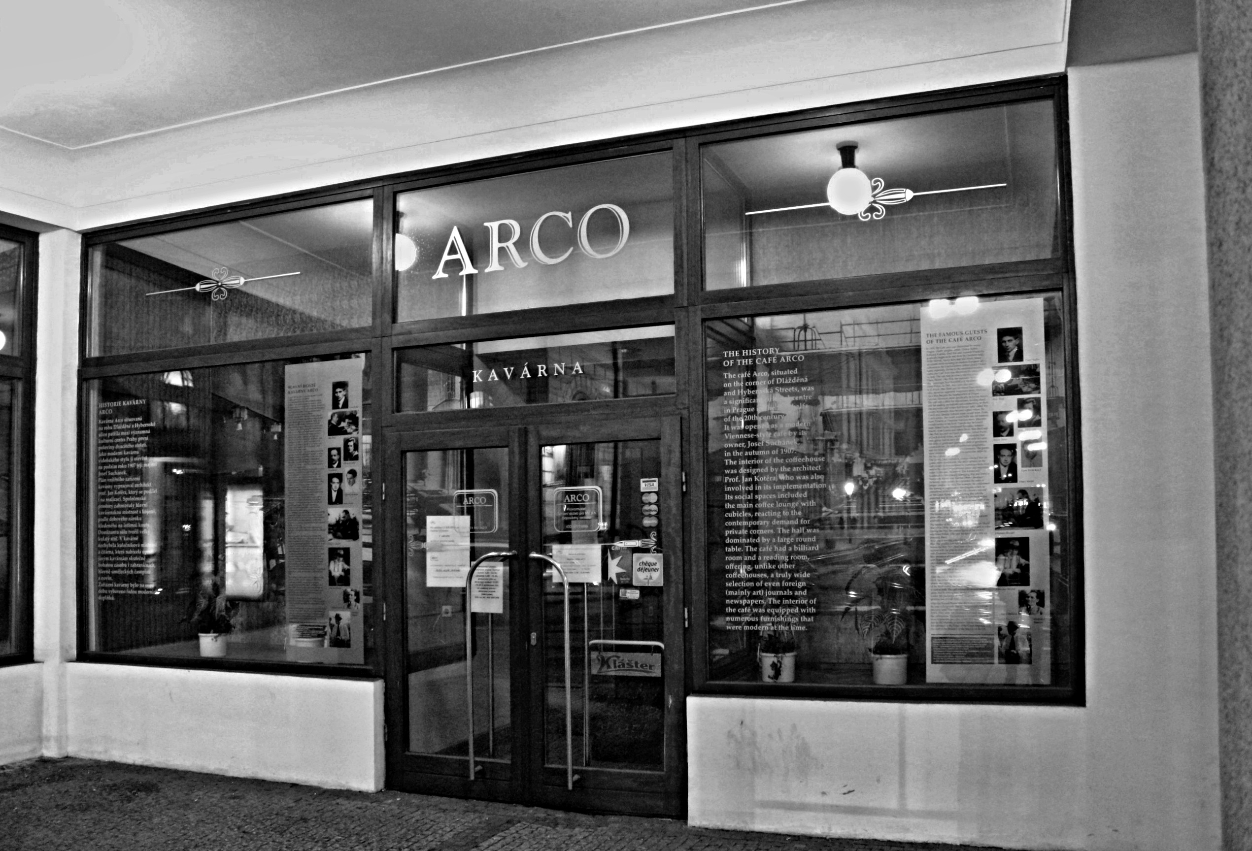 Kavárna Arco Praha